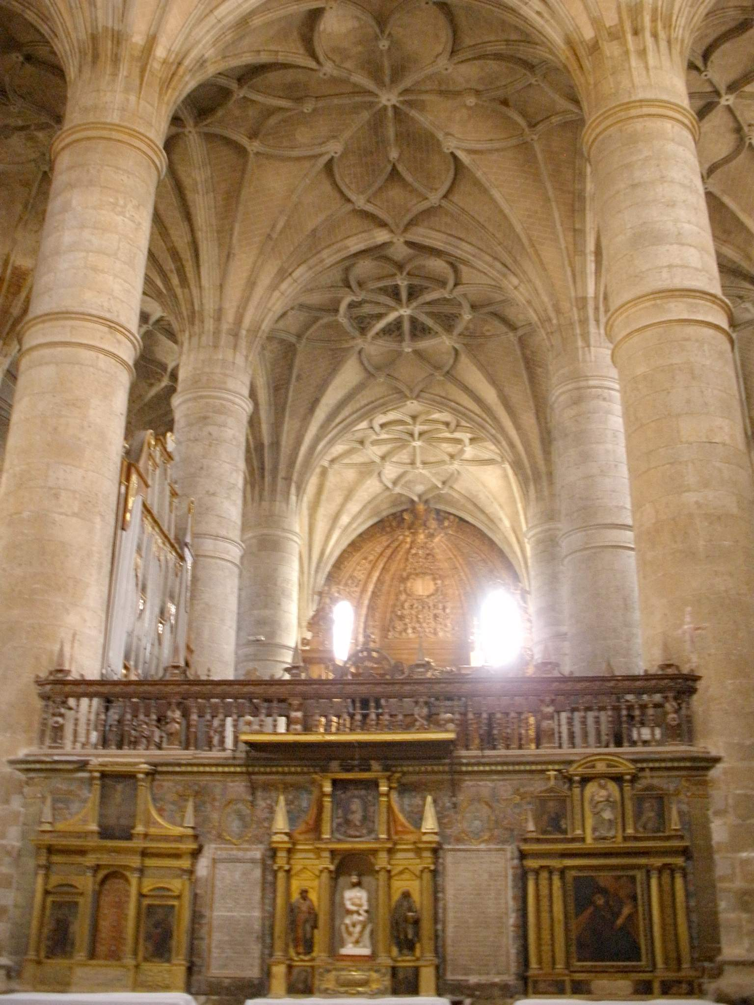 Berlanga de Duero (Soria) - Colegiata de Santa Maria del Mercado